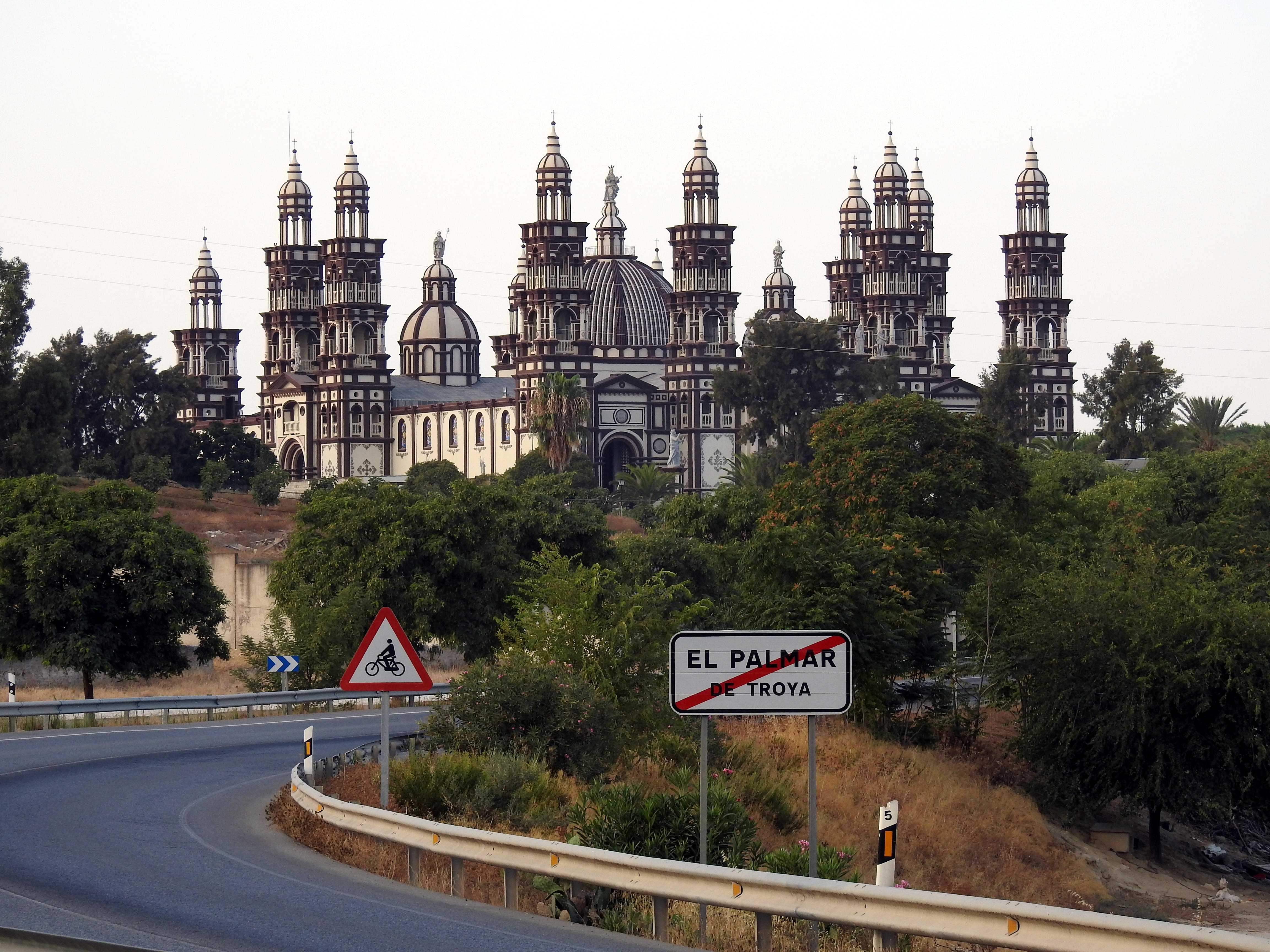 Kathedrale des Gegenpapstes in Palmar de Troya